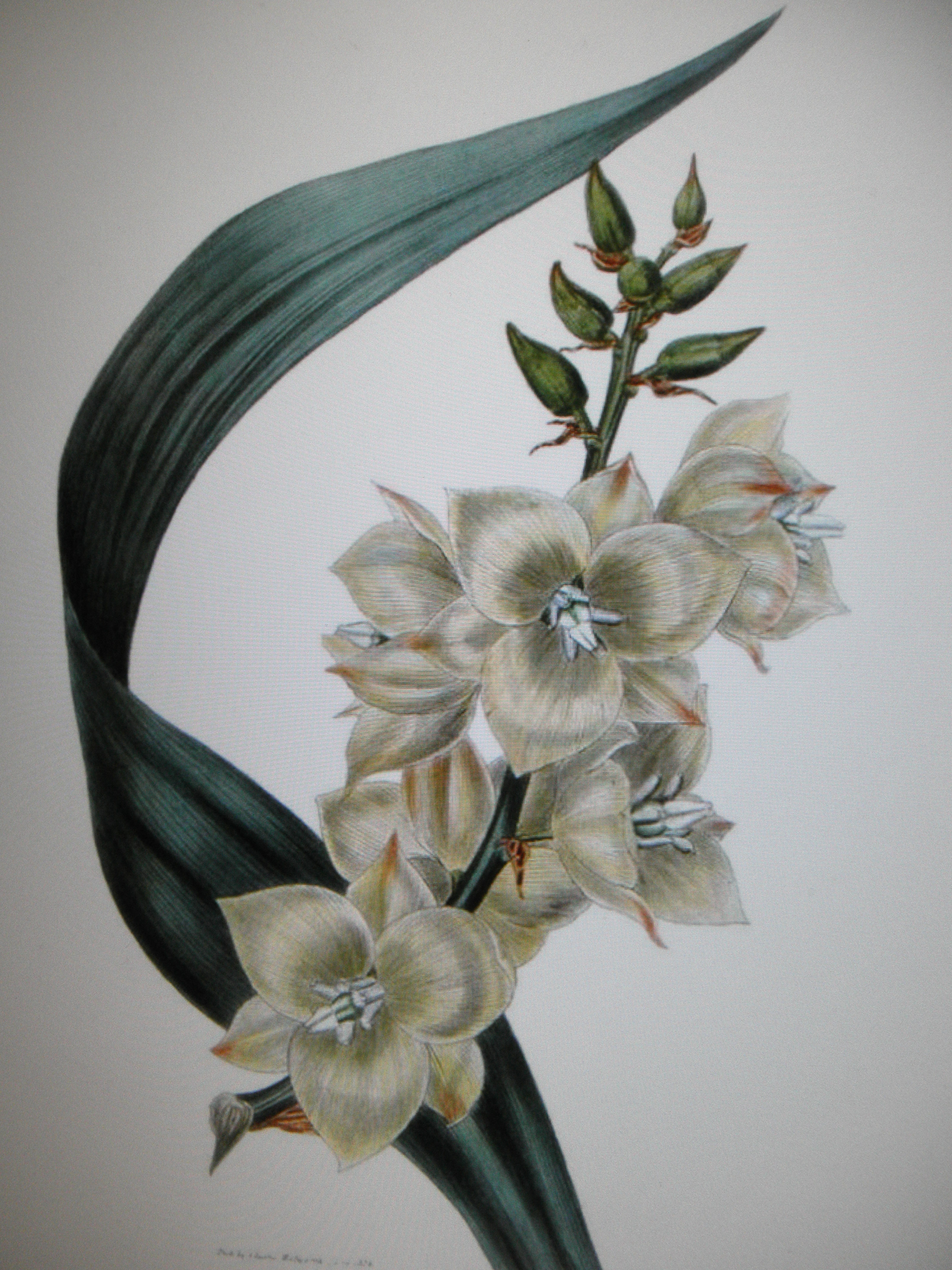 Fleur de Yucca filifera